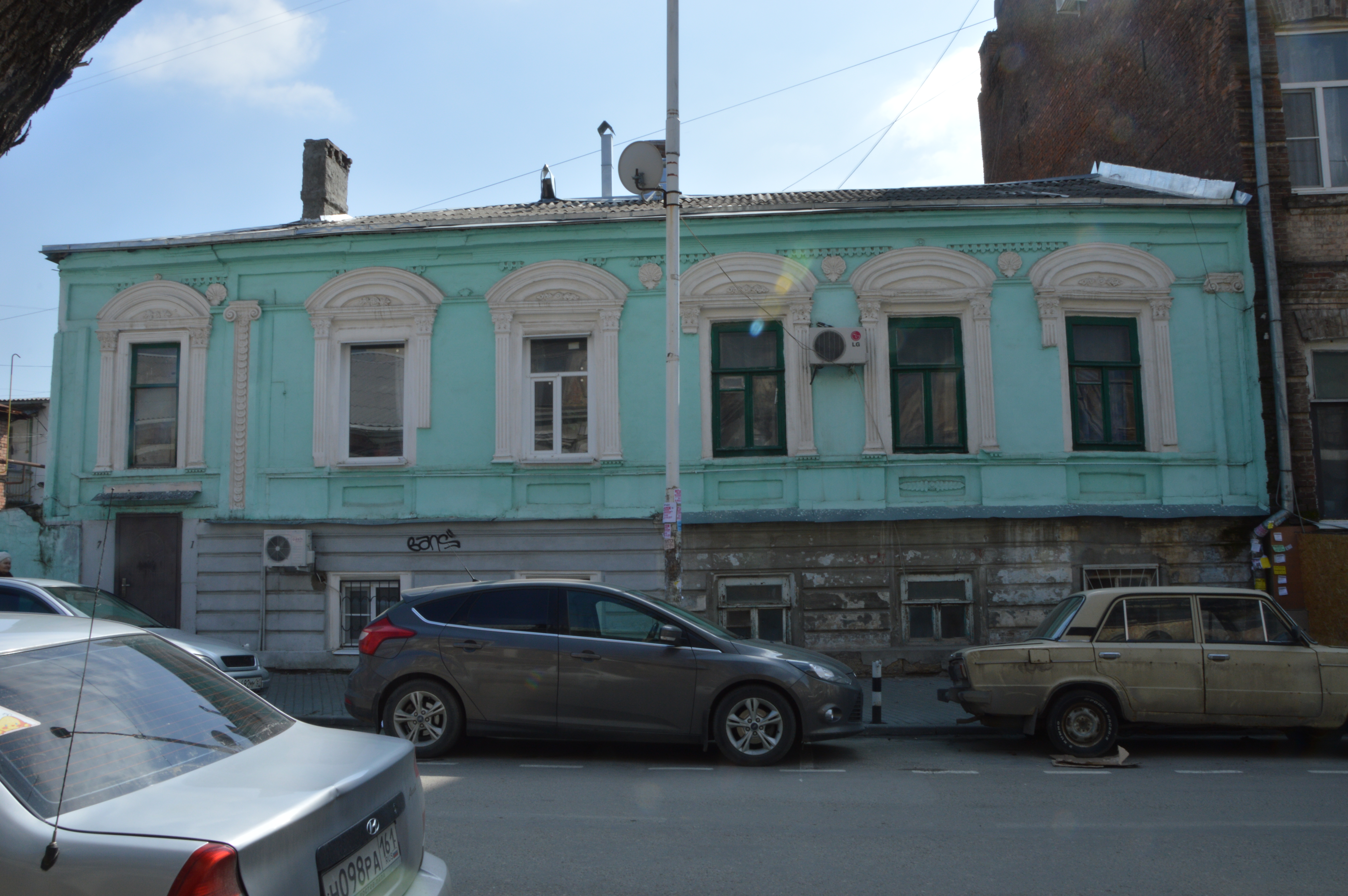 Здание города Ростова-на-Дону